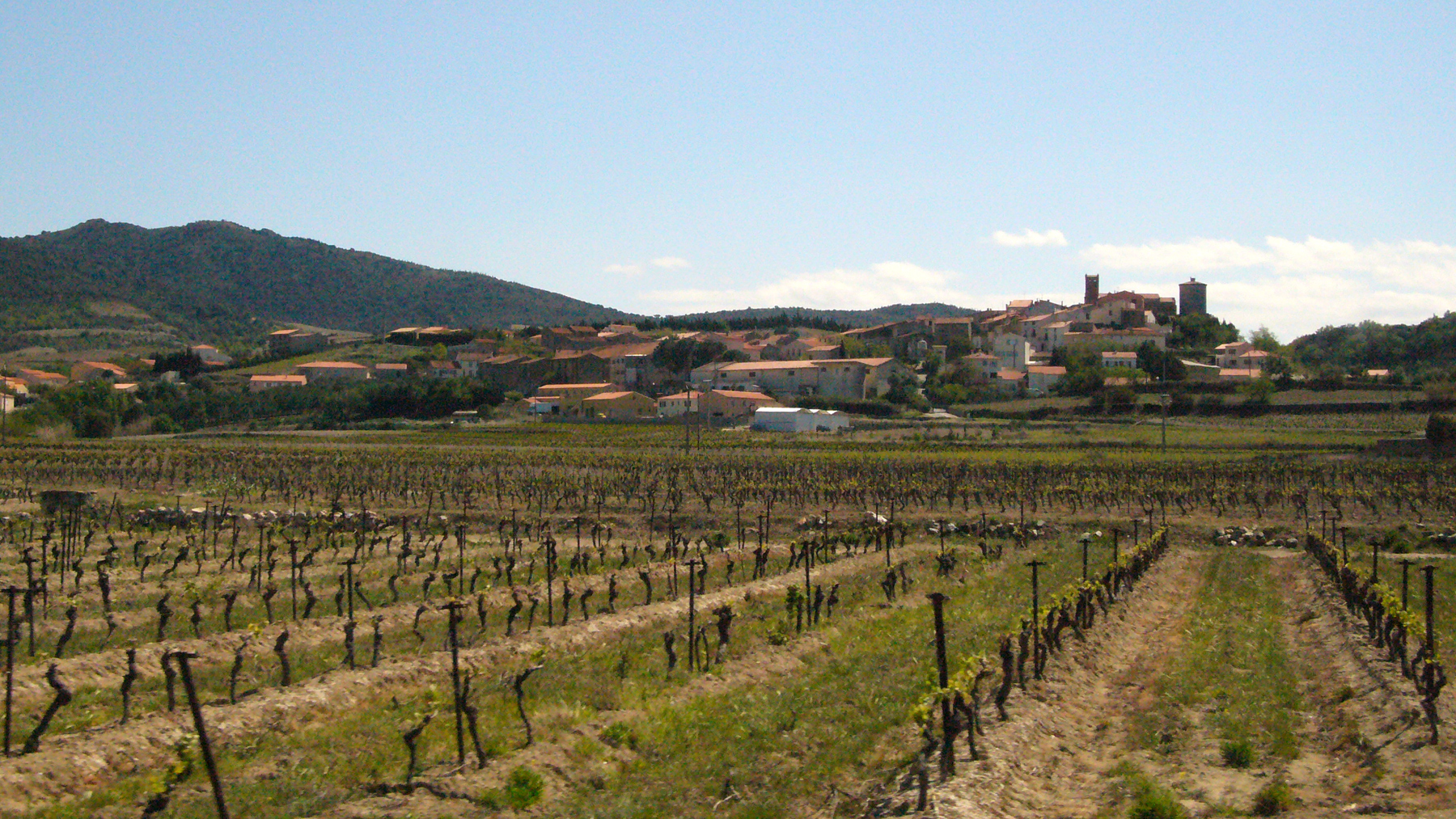 Village de Montner, Pyrénées-Orientales, France